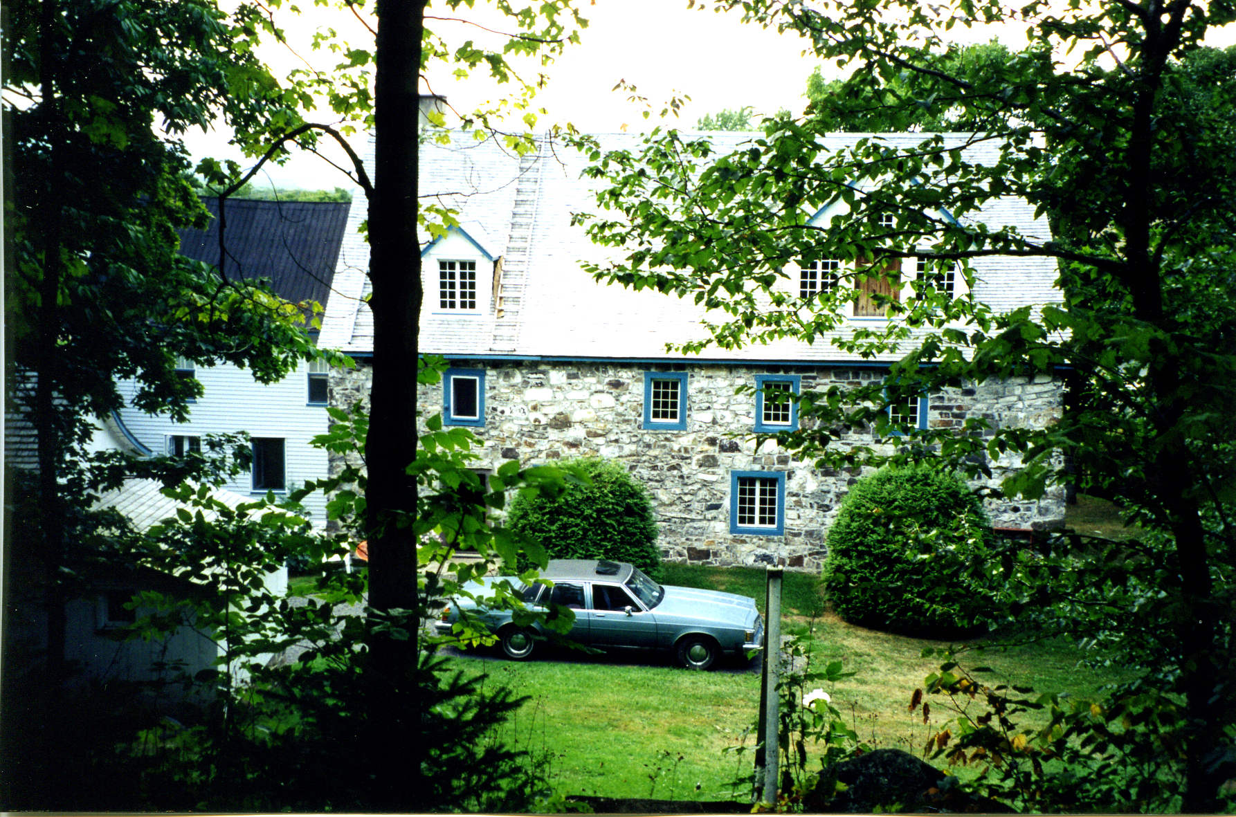 Façade du Moulin du Petit Canton à Saint-Vallier (Chaudière-Appalaches, Québec). Moulin à eau; moulin à farine.